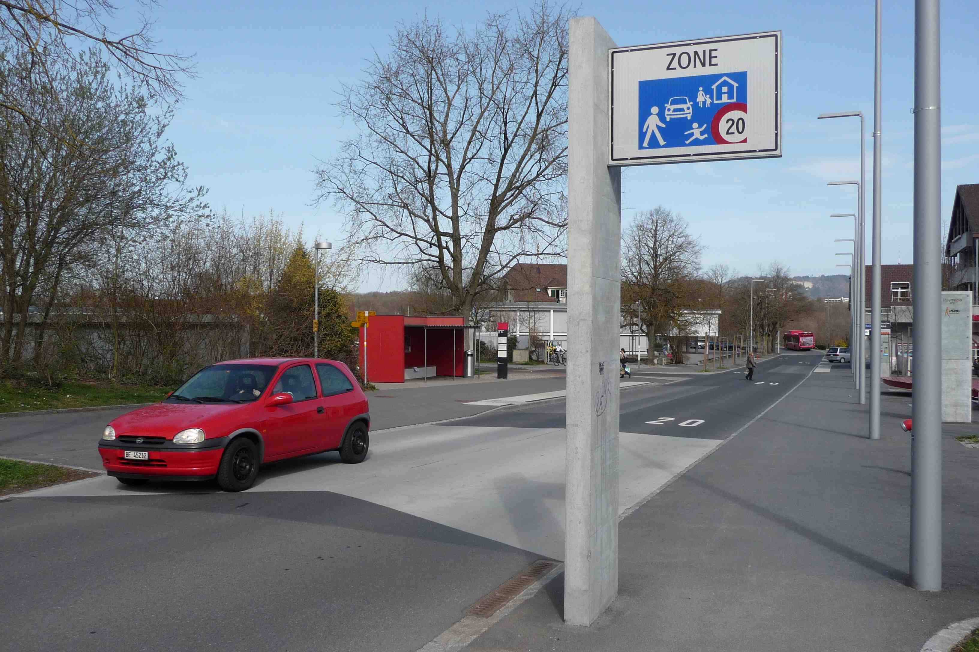 Berner Modell - Kalchacherstrasse Bremgarten bei Bern